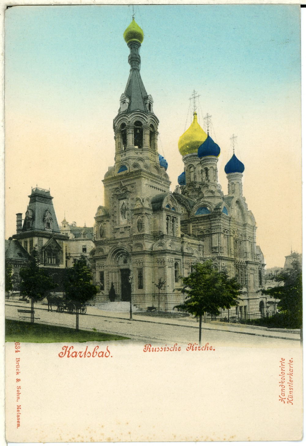 Karlsbad; Russische Kirche This postcard is from publisher Brück & Sohn in Meißen ( postcard has a unique number 00634 and is available in a higher resolution at the publisher. This images was uploaded in a cooperation project between Wikipedians and the publisher.